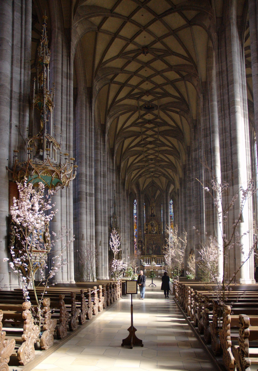 St. Georg Dinkelsbühl